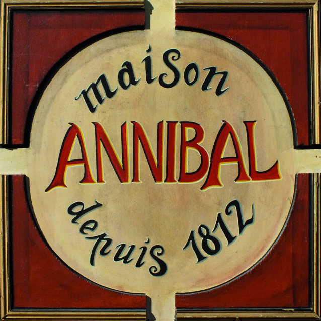 Logo de la Compagnie Annibal et ses Eléphants